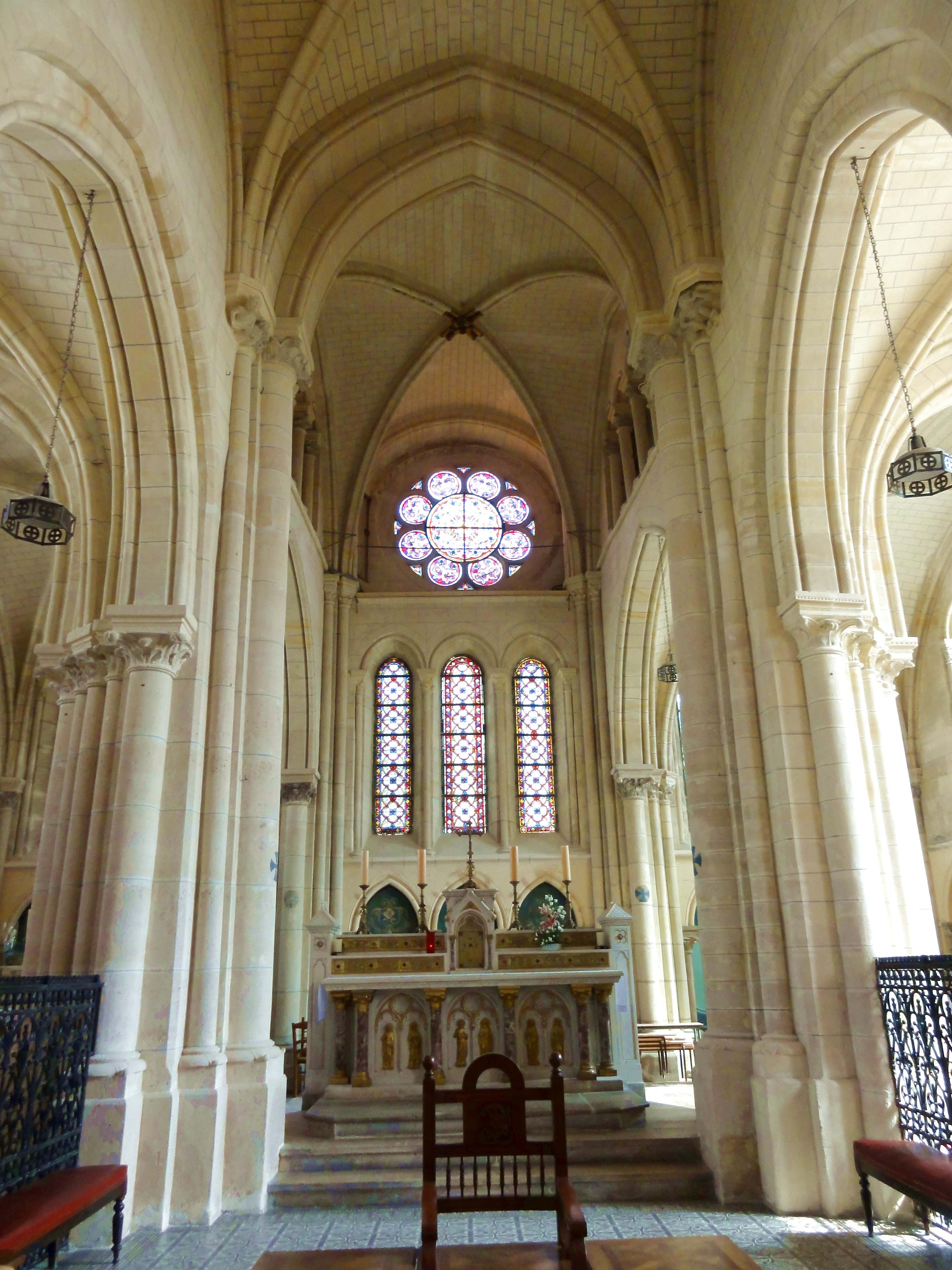 Intérieur de l'église - voir titre.